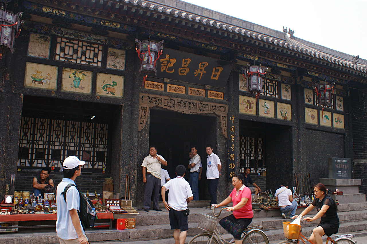 Rih Sheng Chang Bank, Shanxi, China 日昇昌票號，中國山西